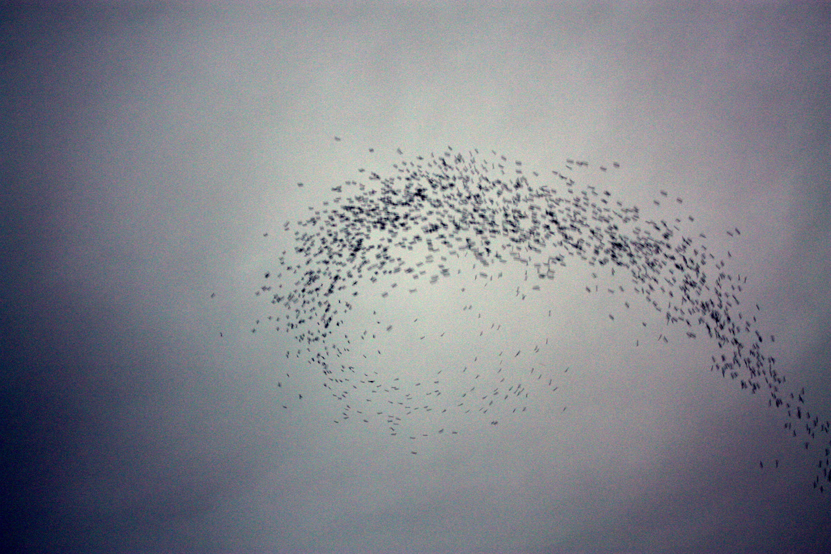 Monroe Swifts-11